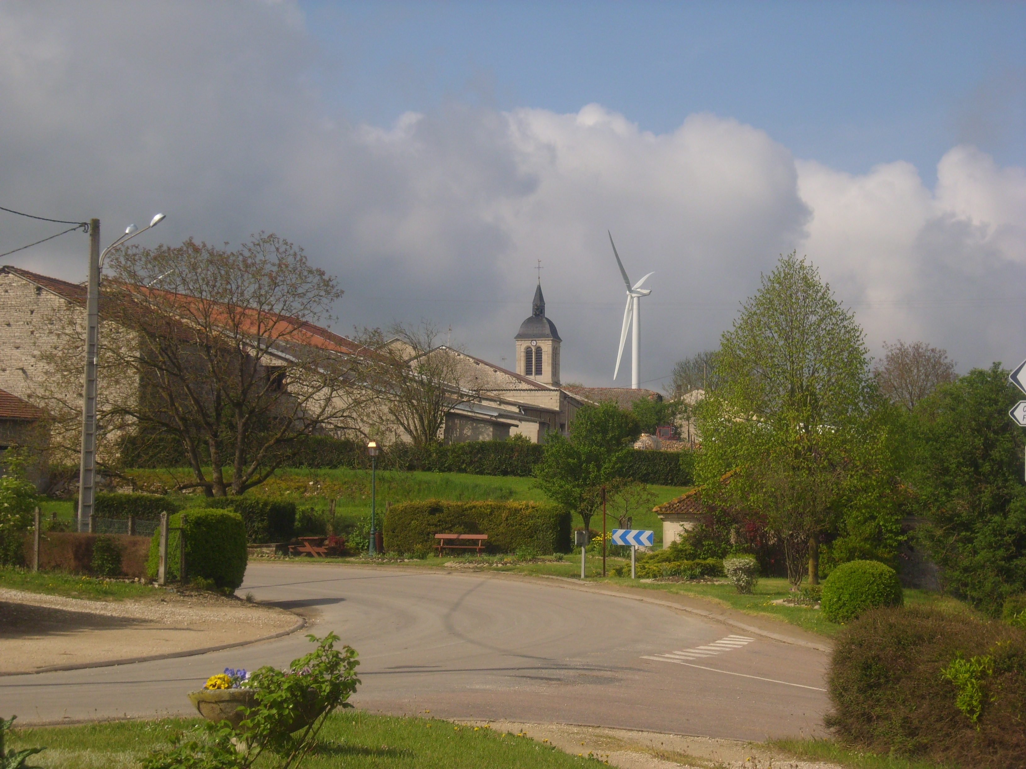 Germay son clocher et sa girouette géante